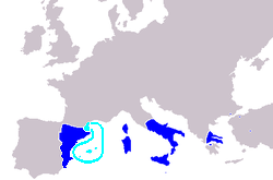 Reino de Mallorca en el Reino de Aragón